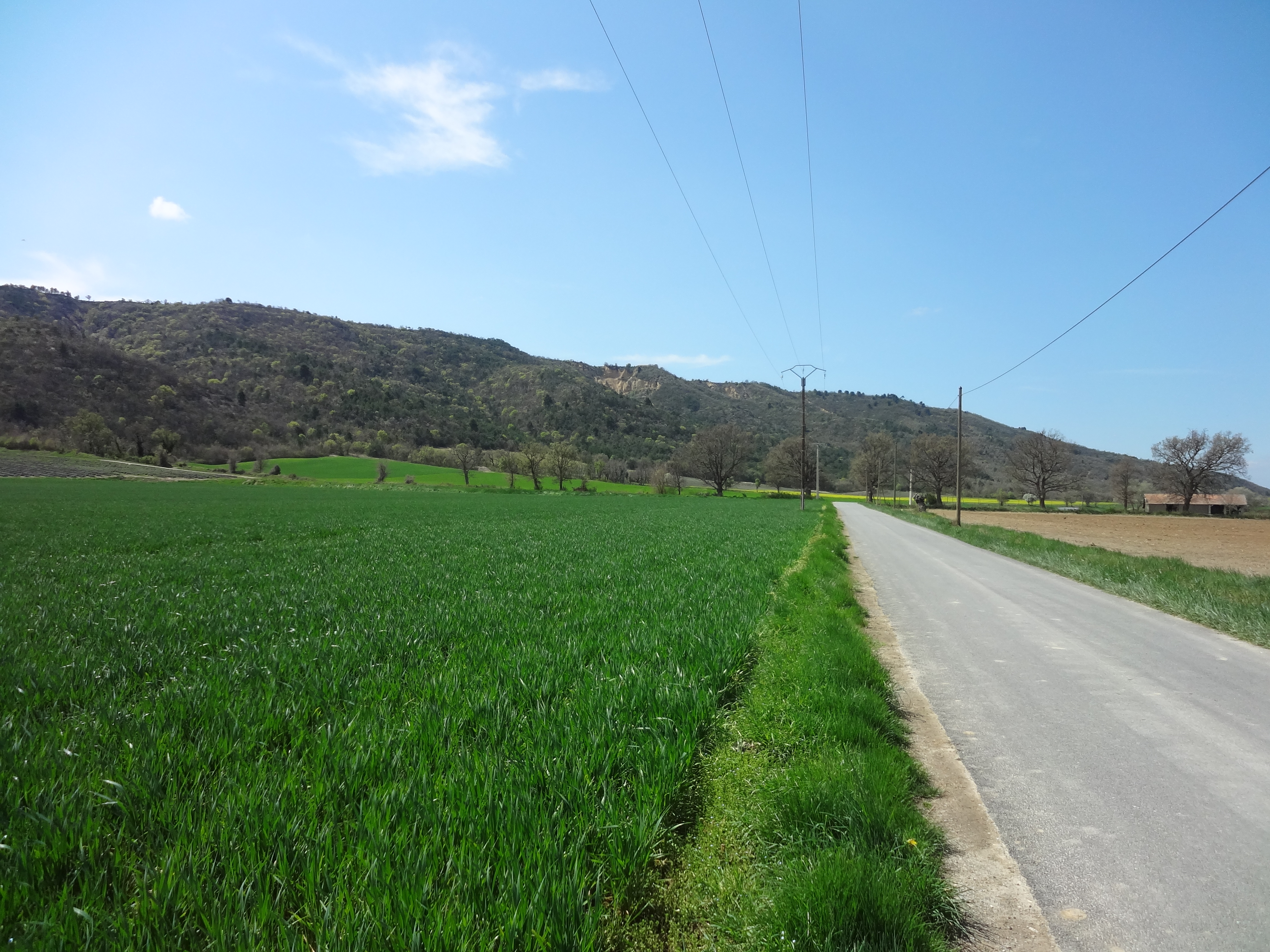 Saint-Julien-d'Asse (rive gauche) et au sud de l'Asse